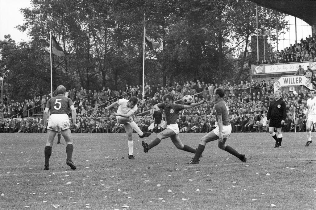 im Holsteinstadion. Im Bild u.a. Holsteins Werner Bähnck (1.v.l.), Günter Tams (3.v.l.) und Klaus-Hinrich Jess (4.v.l.), sowie Gladbachs Jupp Heynckes (2.v.l.) und Günter Netzer (6.v.l.).